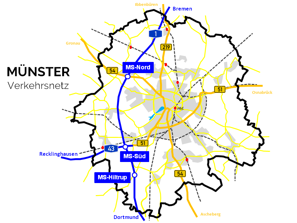 Verkehrskarte von Münster mit Straßen- und Schienennetz - Münster (Westf), Nordrhein-Westfalen, Deutschland